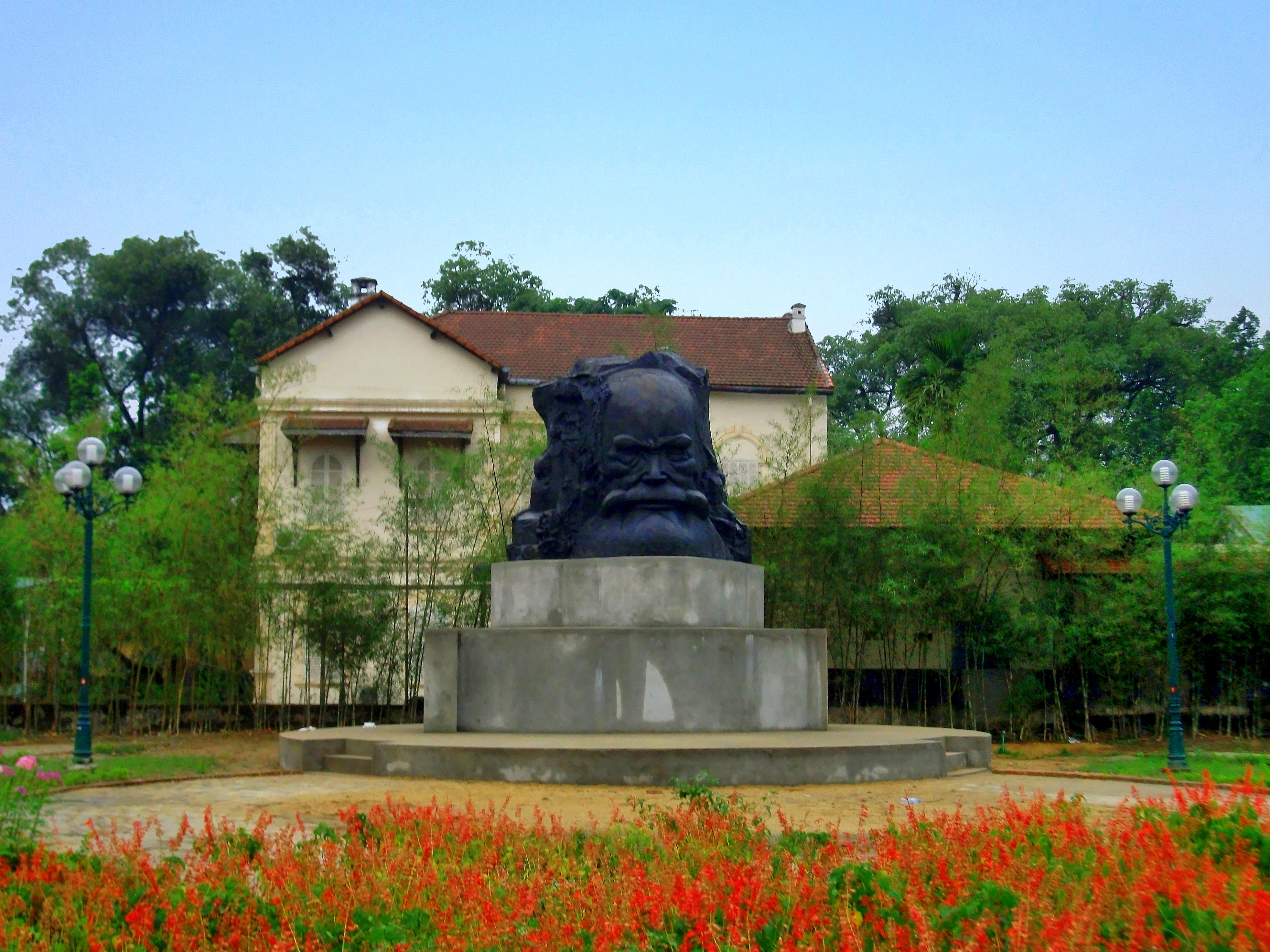 Tượng đồng Phan Bội Châu tại công viên số 19 Lê Lợi (bên sông Hương và bên cầu Trường Tiền) thuộc TP. Huế. Trước tháng 3 năm 2012, tác phẩm điêu khắc này được đặt trong khu nhà lưu niệm ông (119, đường Phan Bội Châu, TP. Huế).